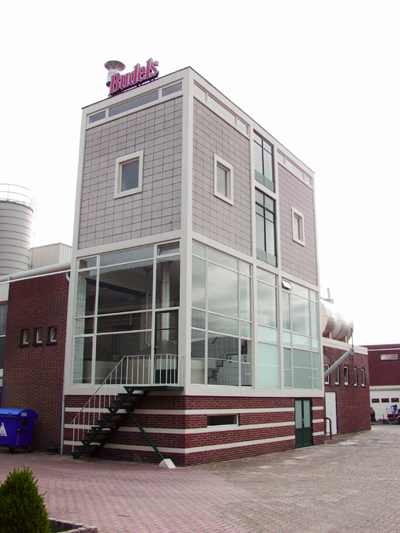 Brouwhuis Budelse Brouwerij